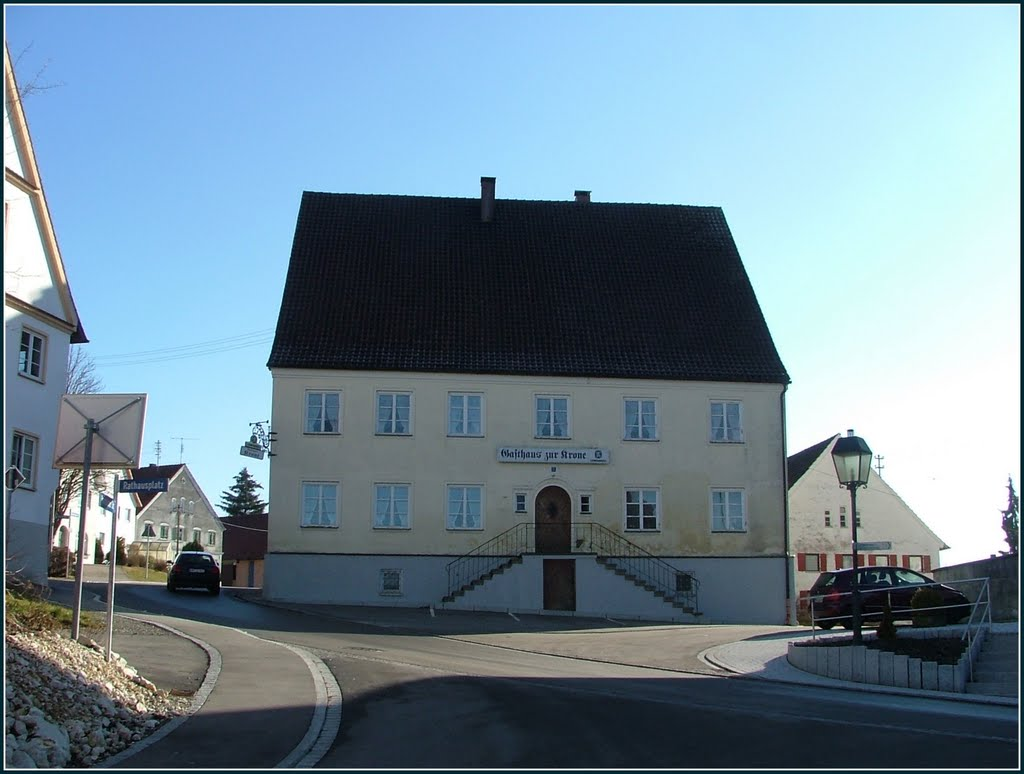 Zur Krone